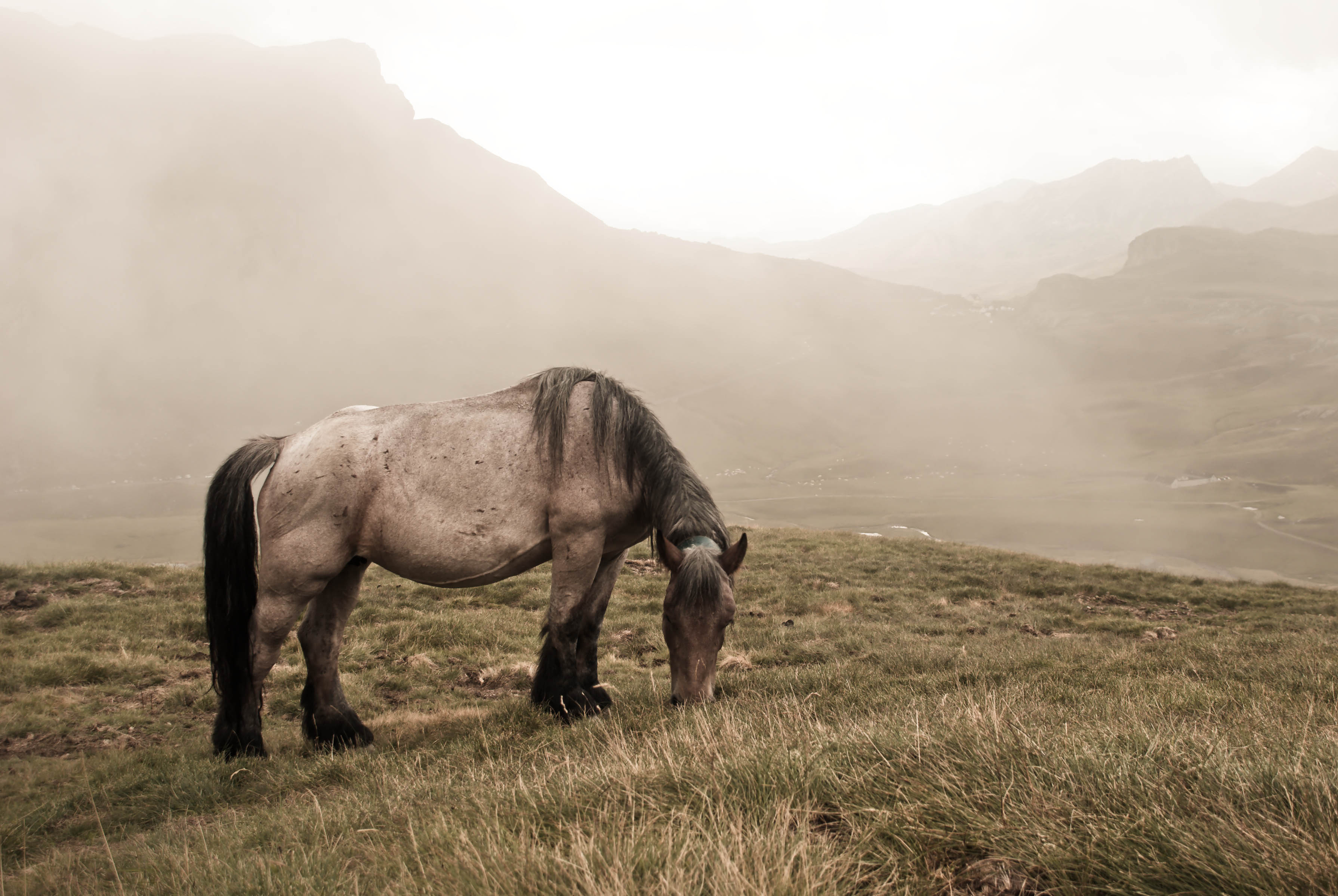 Cheval de trait Ardennais au pays d'Ossau, dans les Pyrénées